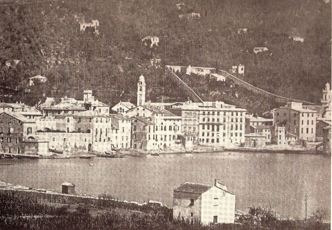 Il complesso monastico delle Clarisse intorno al 1870, Rapallo, Liguria, Italia